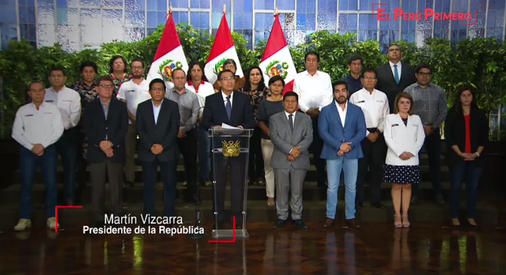 Martín Vizcarra en su mensaje a la nación contra para decretar el Estado de emergencia ante la pandemia de coronavirus